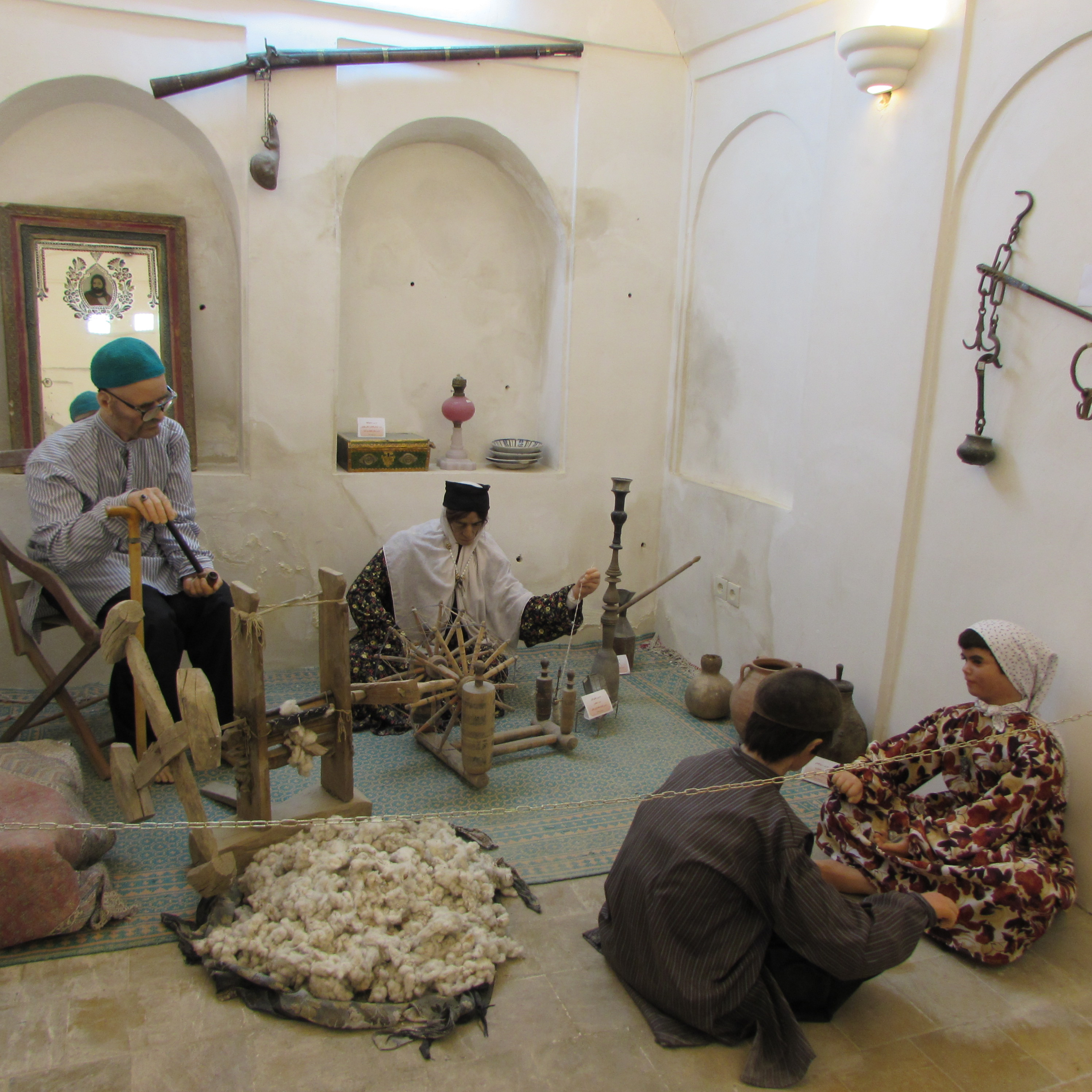 موزه مردم شناسی .خانه صولت .ابرکوه